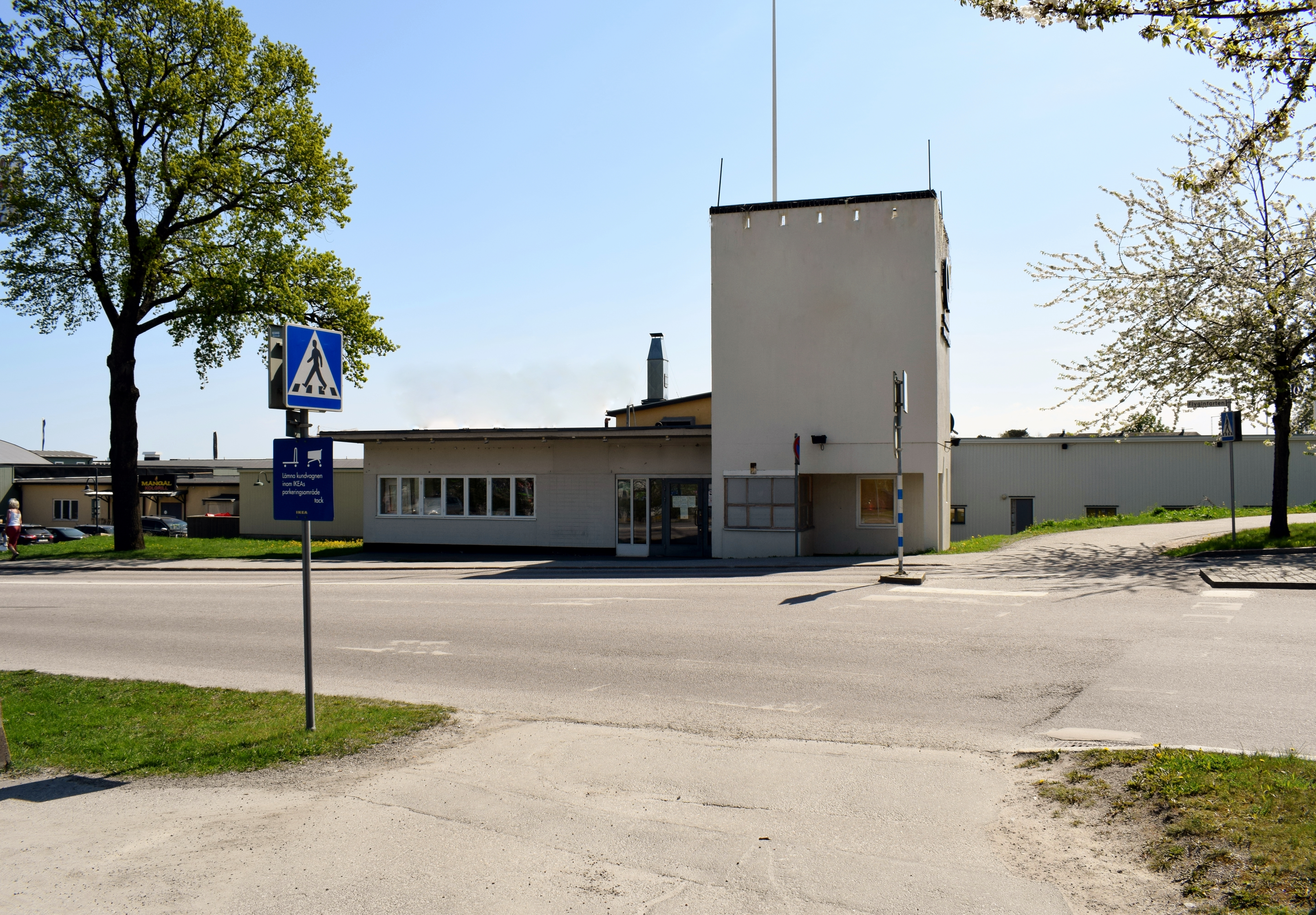 Före detta vaktkasernen vid F 8 Barkarby, sedan 1990-talet en del av Stockholm Quality Outlet i Järfälla kommun.